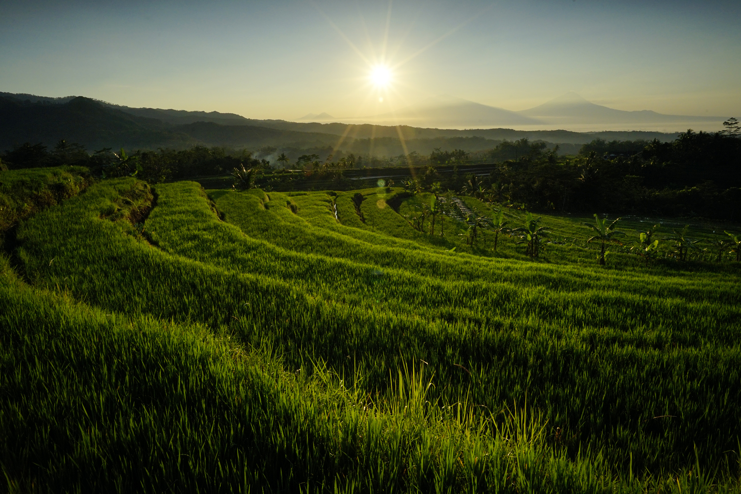 Kajoran, sebuah desa di kaki gunung Sumbing Magelang Jawa Tengah yang alam dan desanya sungguh memesona. Hamparan sawah yang menghijau nampak matahari keluar di antara Gunung Merbabu dan Gunung Merapi. Sungguh pemandangan yang sangat luar biasa pagi itu.